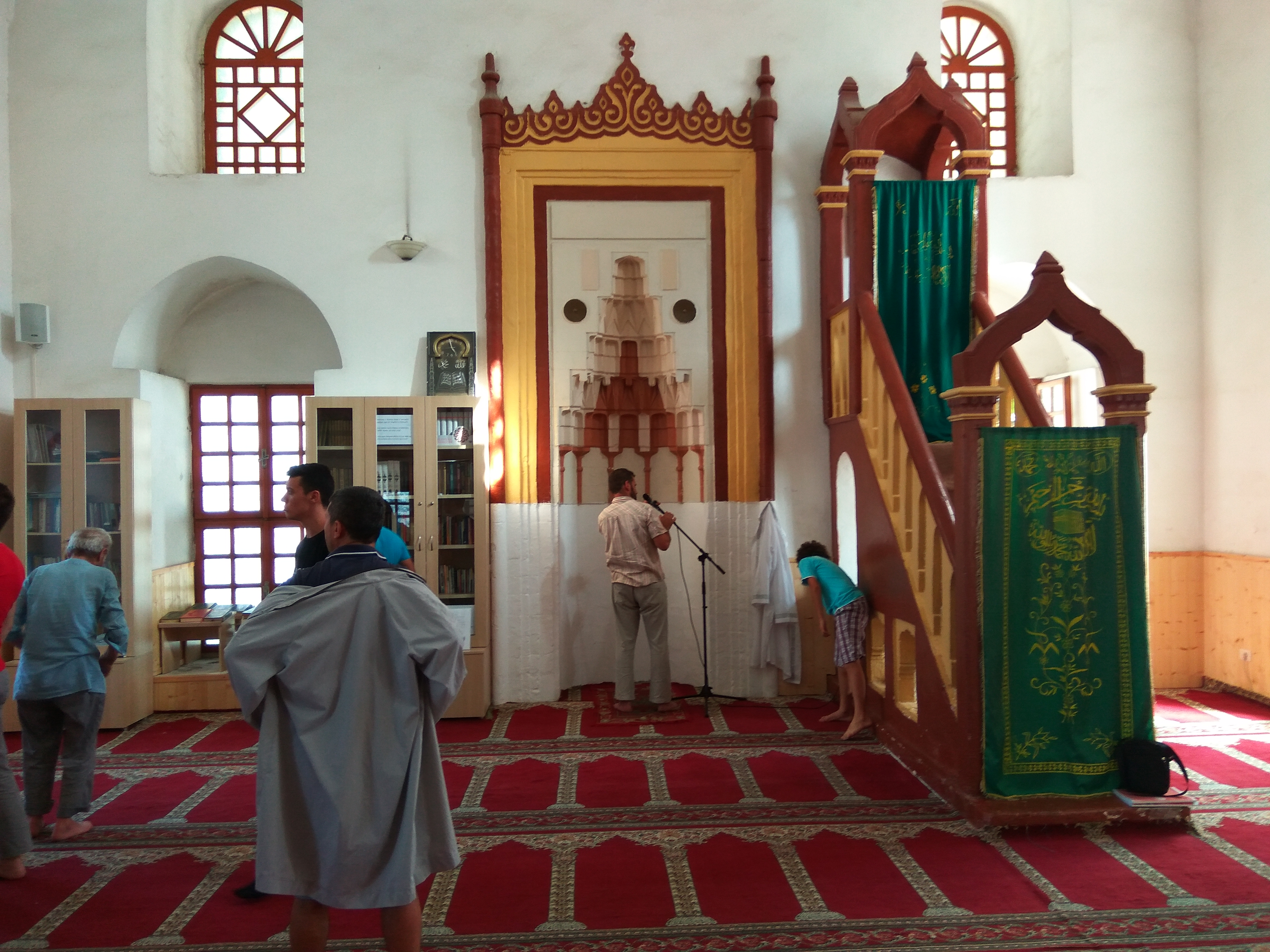 Xhamia e Muradies